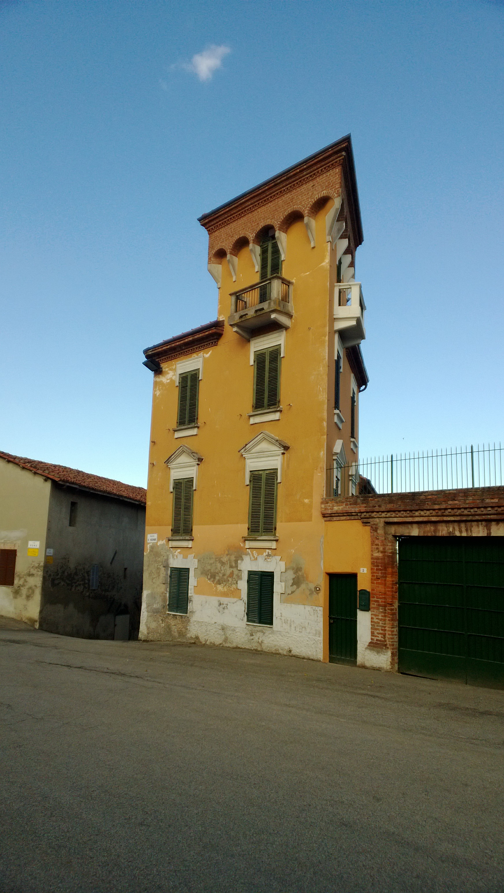 Palazzo antico a Villa San Secondo (AT), Italia.